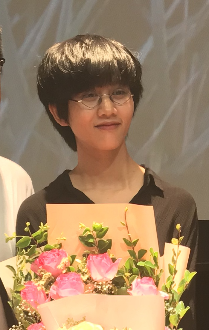 Lê Cát Trọng Lý - khách mời tại buổi giới thiệu sách ở L'Espace Tràng Tiền, Hà Nội.